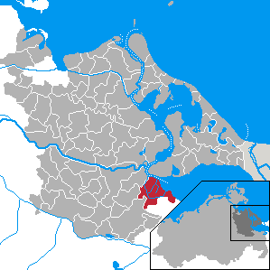 Bugewitz, Landkreis Ostvorpommern, Mecklenburg-Vorpommern